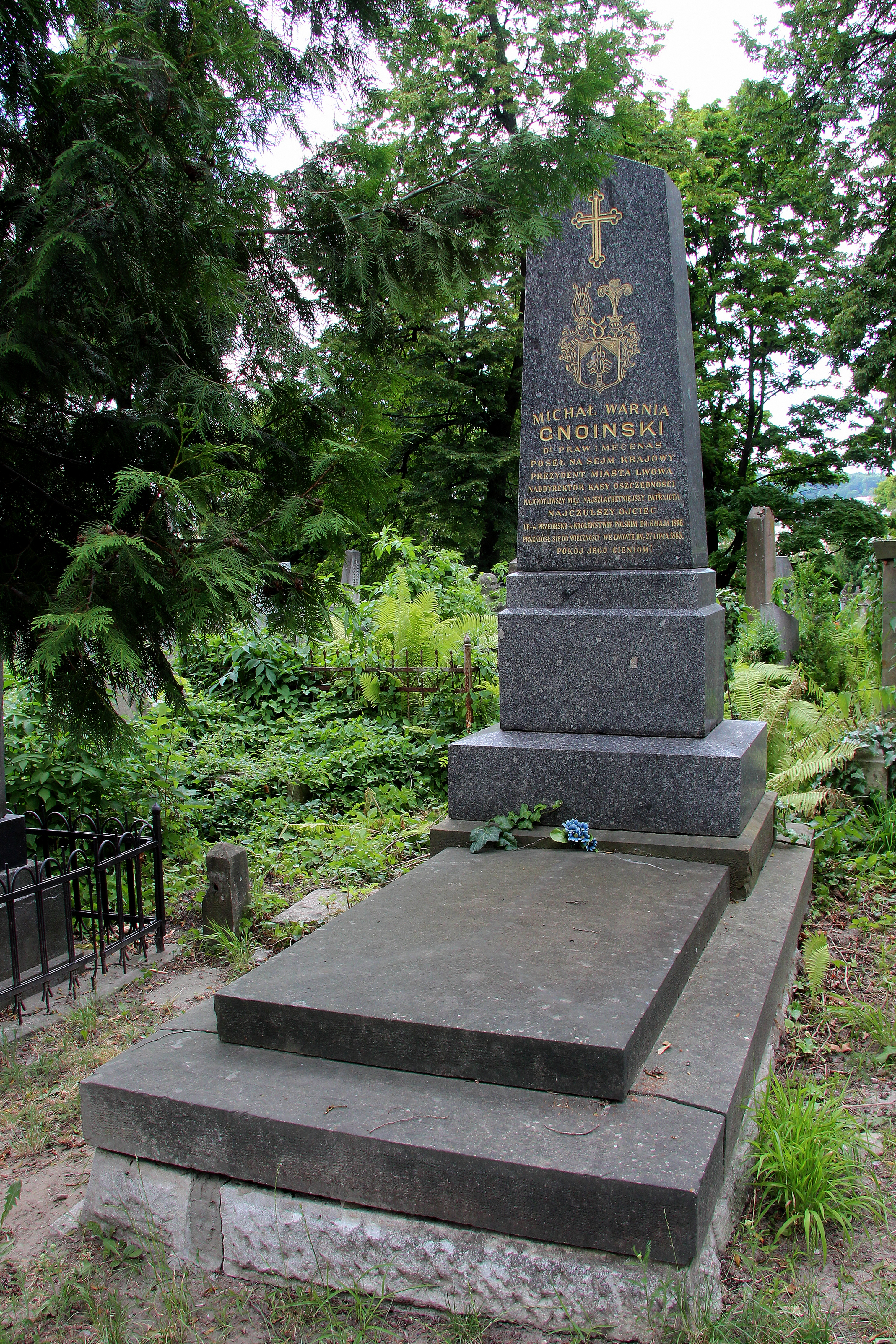 Michał Gnoiński na cmentarzu Łyczakowskim